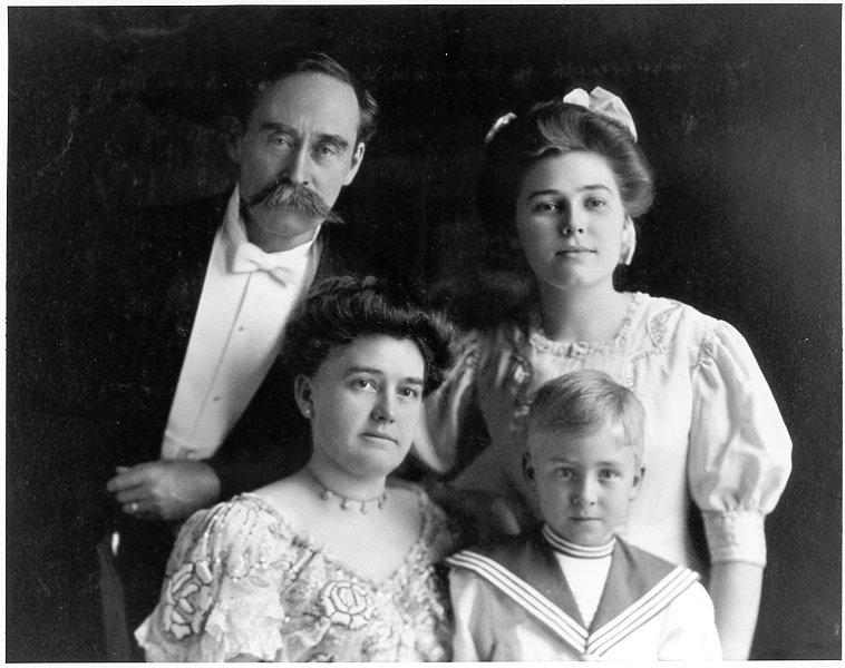 Семья Роберта Пири: (1856 - 1920)